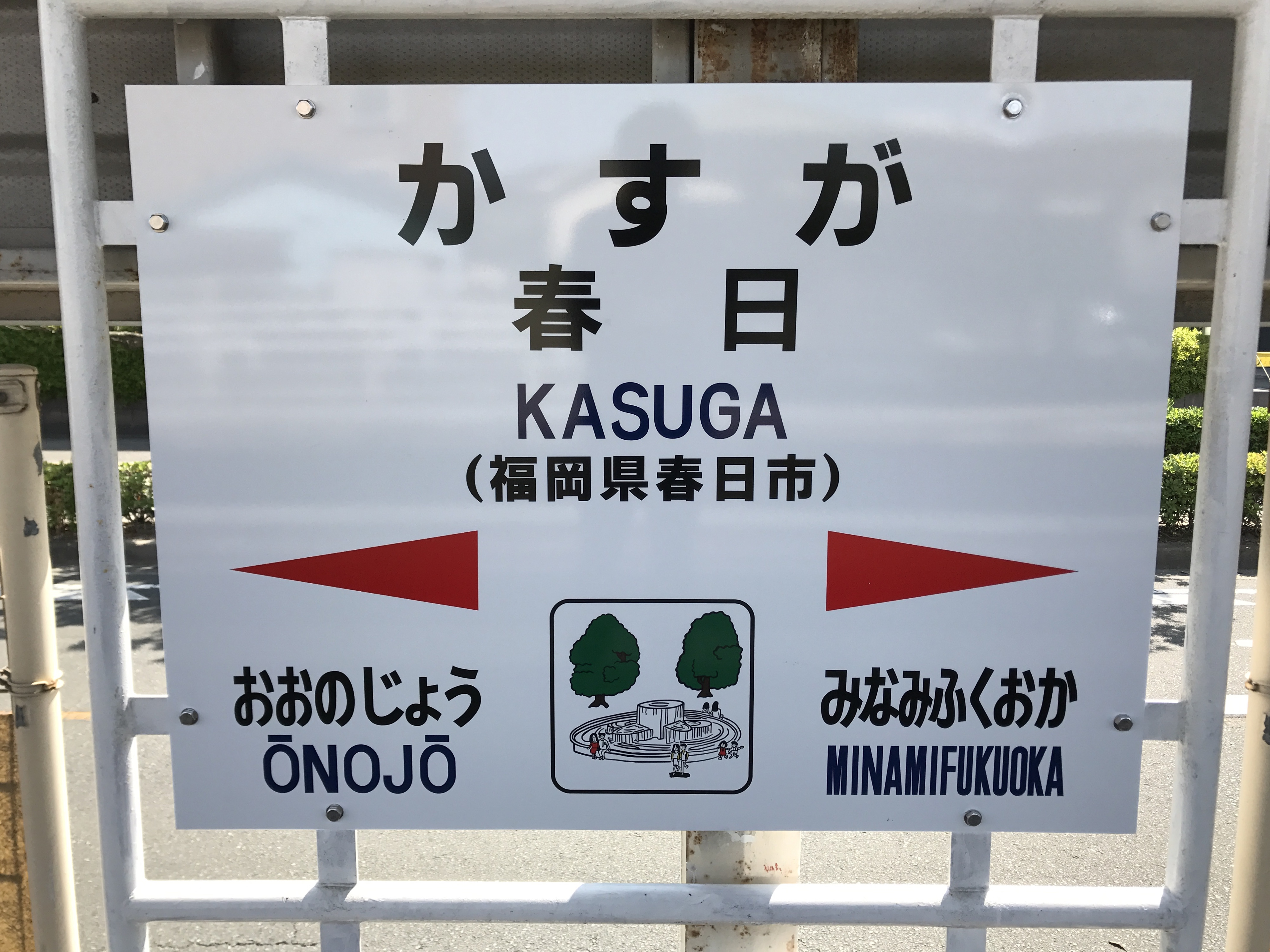 春日駅の駅名標。イラストは春日公園